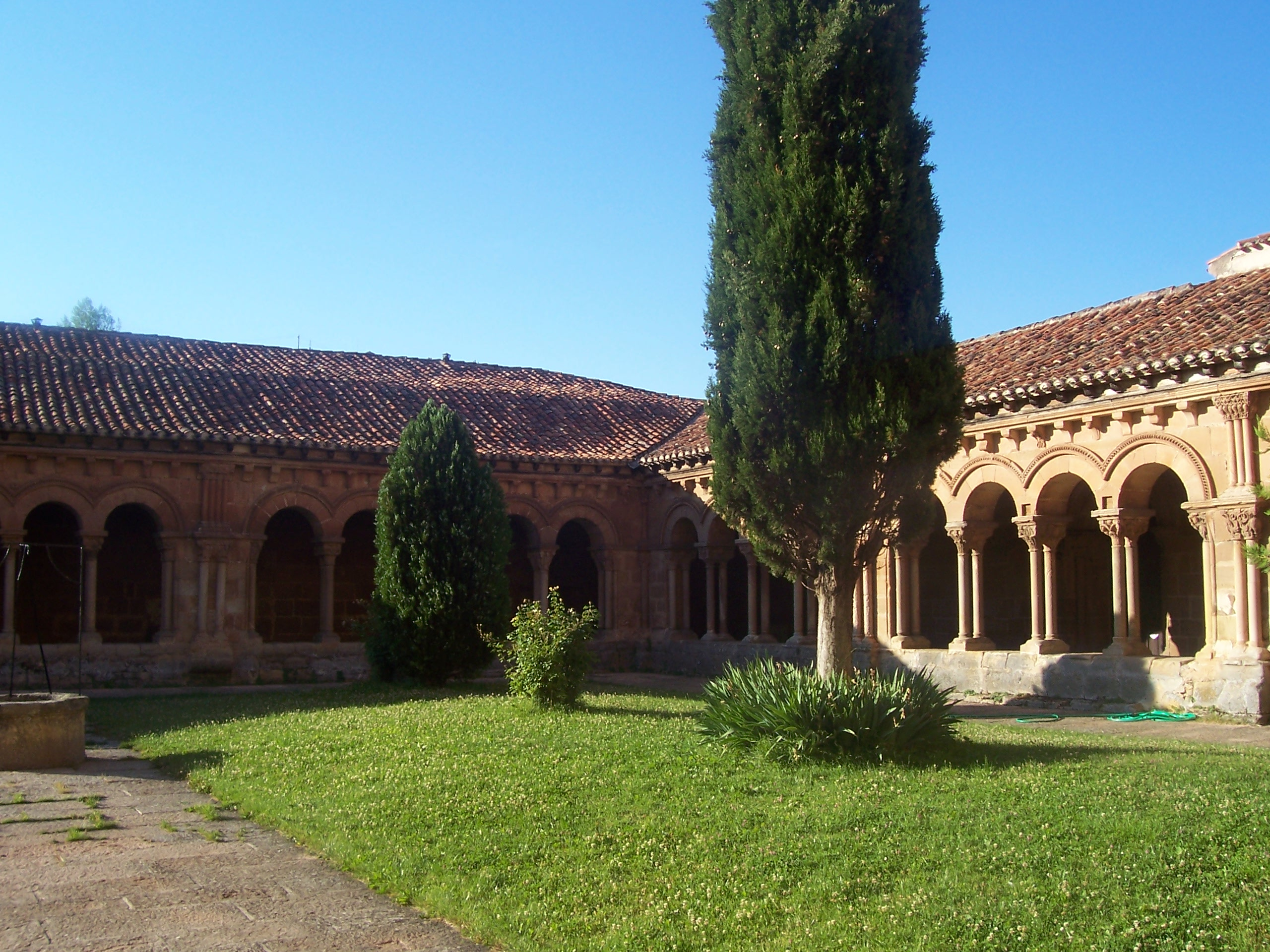 Claustro de San Pedro (Soria)